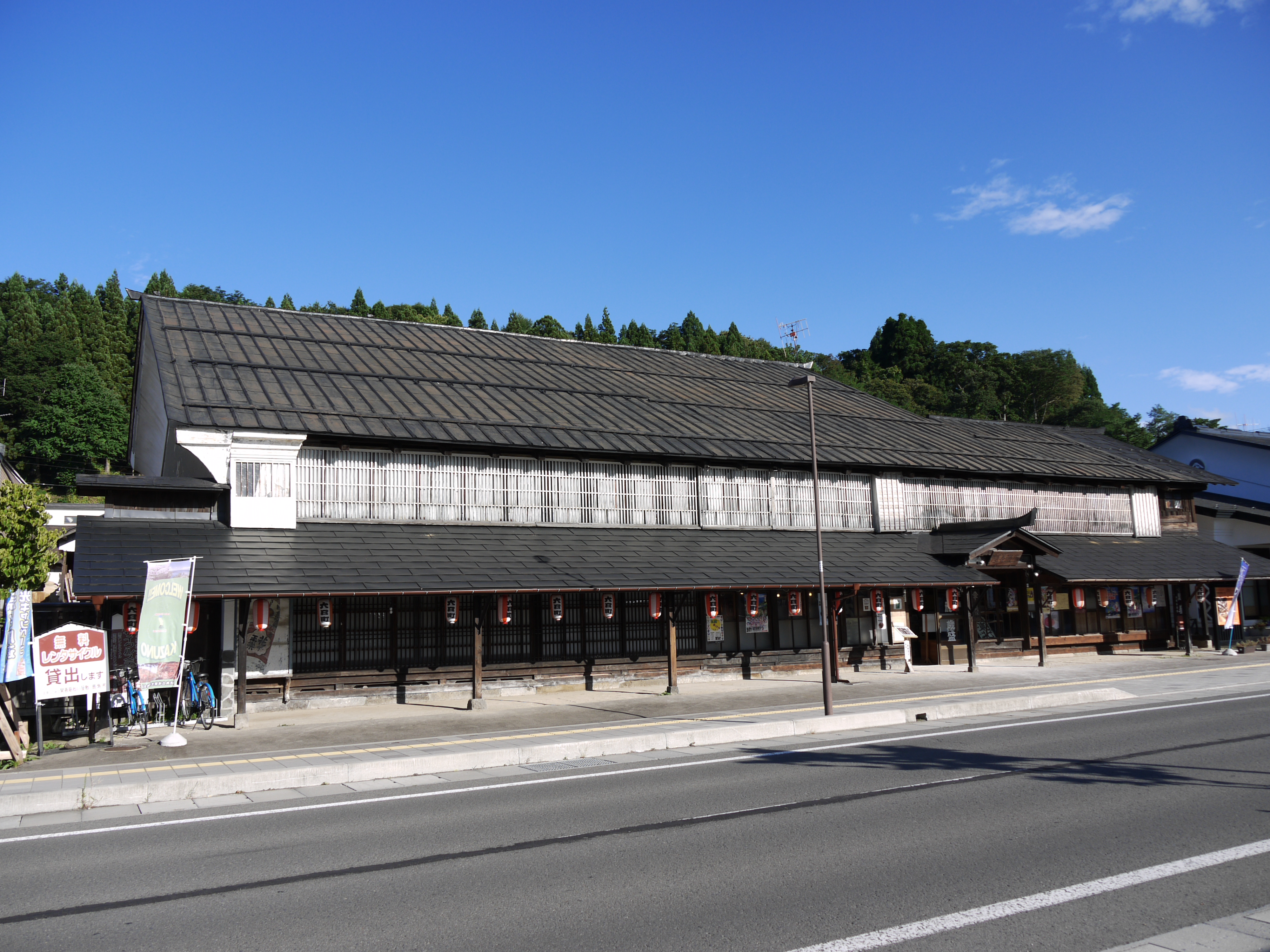 関善賑わい屋敷 全景